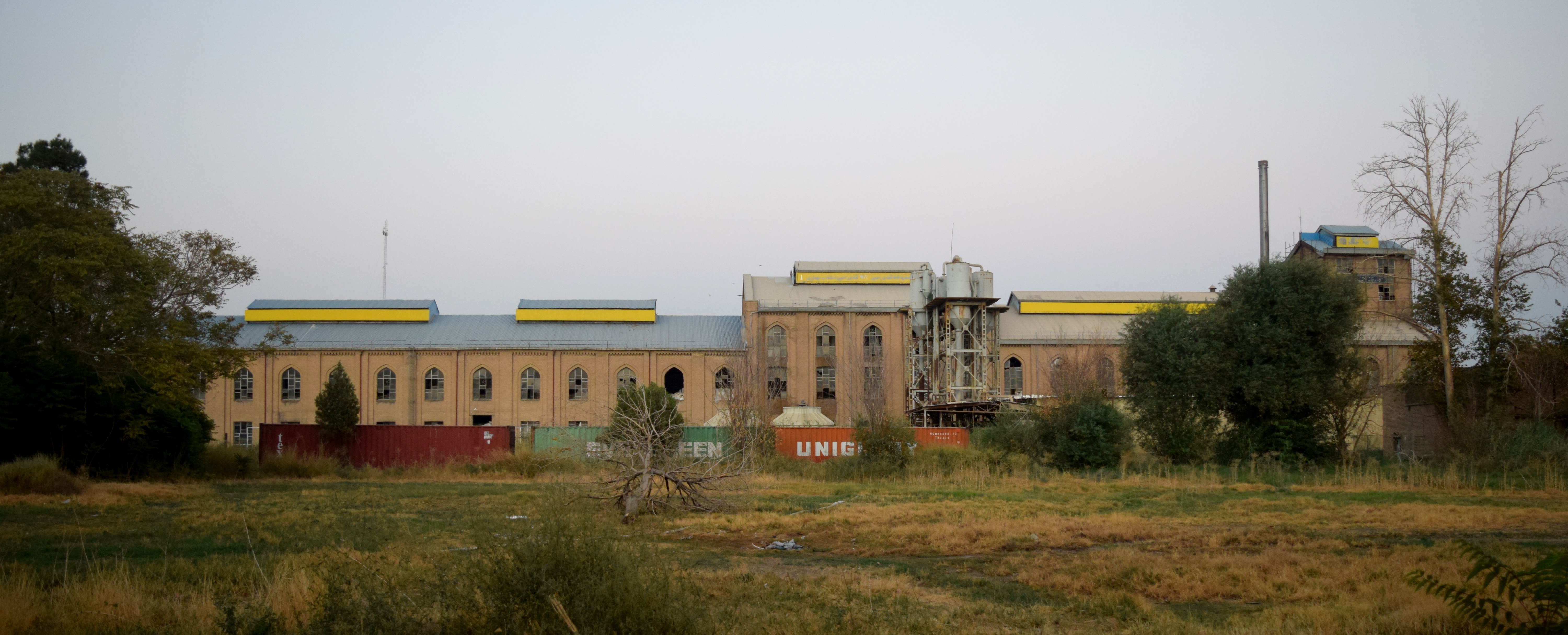 تصفیه خانه قند ورامین